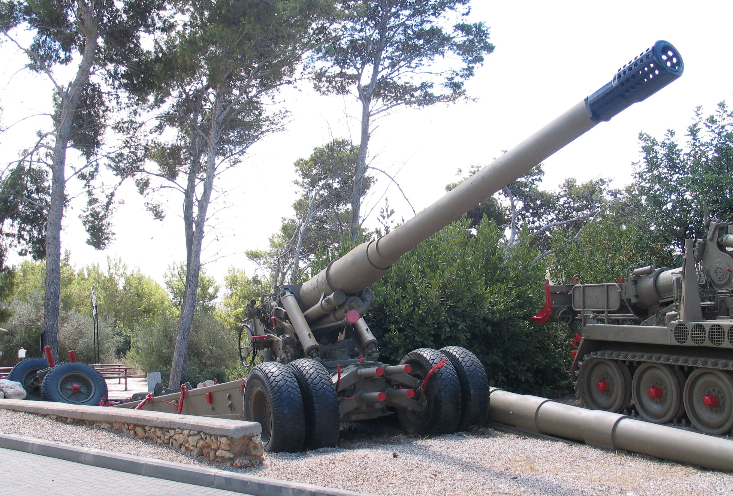 Soviet S-23 180 mm gun in Beyt ha-Totchan, Zichron Yaakov, Israel.